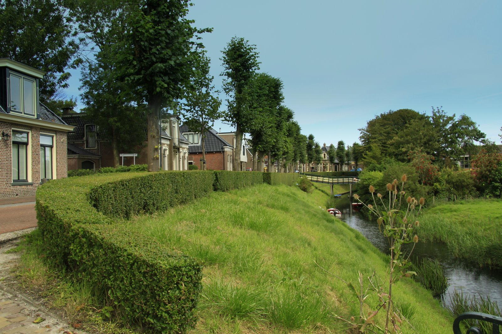 Oude Bildtzijl een dijkdorp hoog in Friesland in de Gemeente Het Bildt